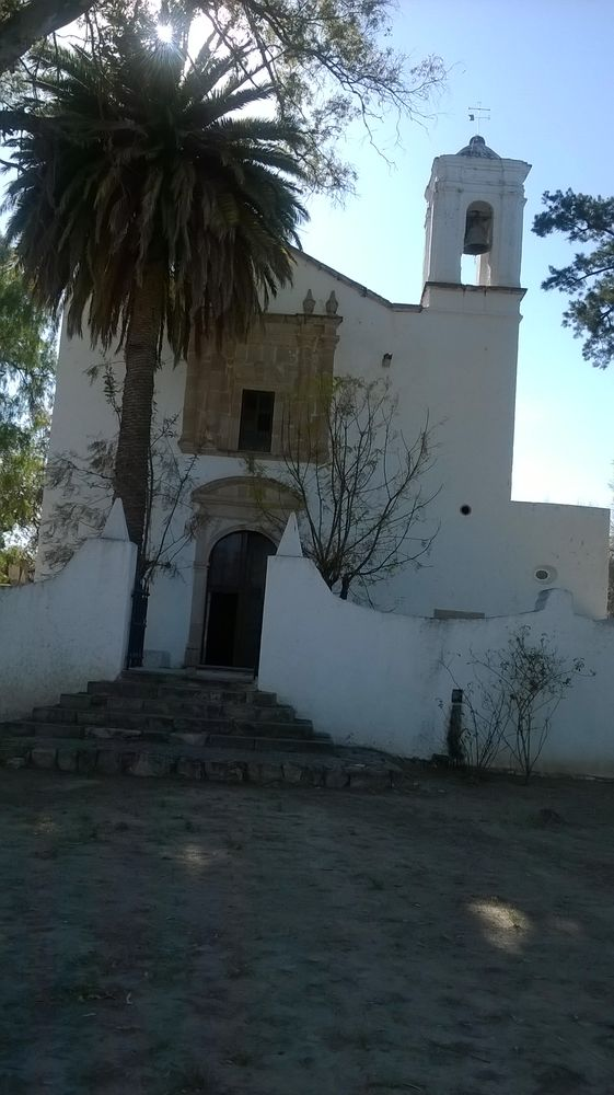 Frente de la Capilla de Nuestra Señora del Refugio en la ex hacienda El Mezquite, localizada en el municipio de Pabellón de Arteaga.